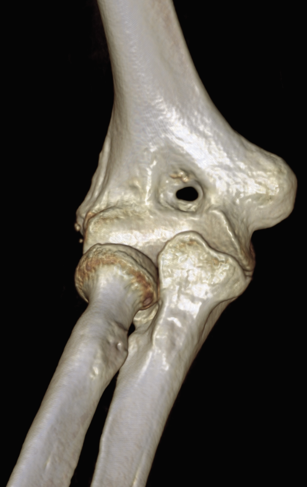 Zufallsbefund eines supratrochlearen Foramens bei einem 66-jährigen. Darstellung in der CT als Volumen-Rendering.